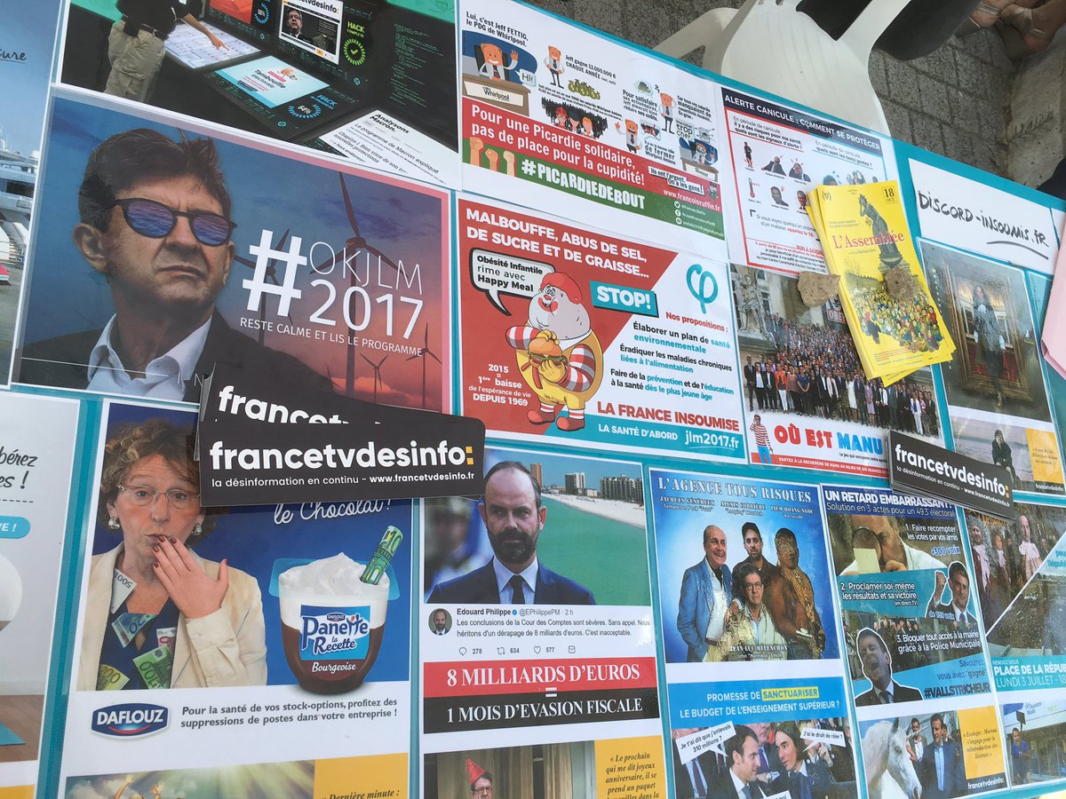 Plusieurs visuels produits par le Discord insoumis, exposés aux AmPhis d'août 2017.